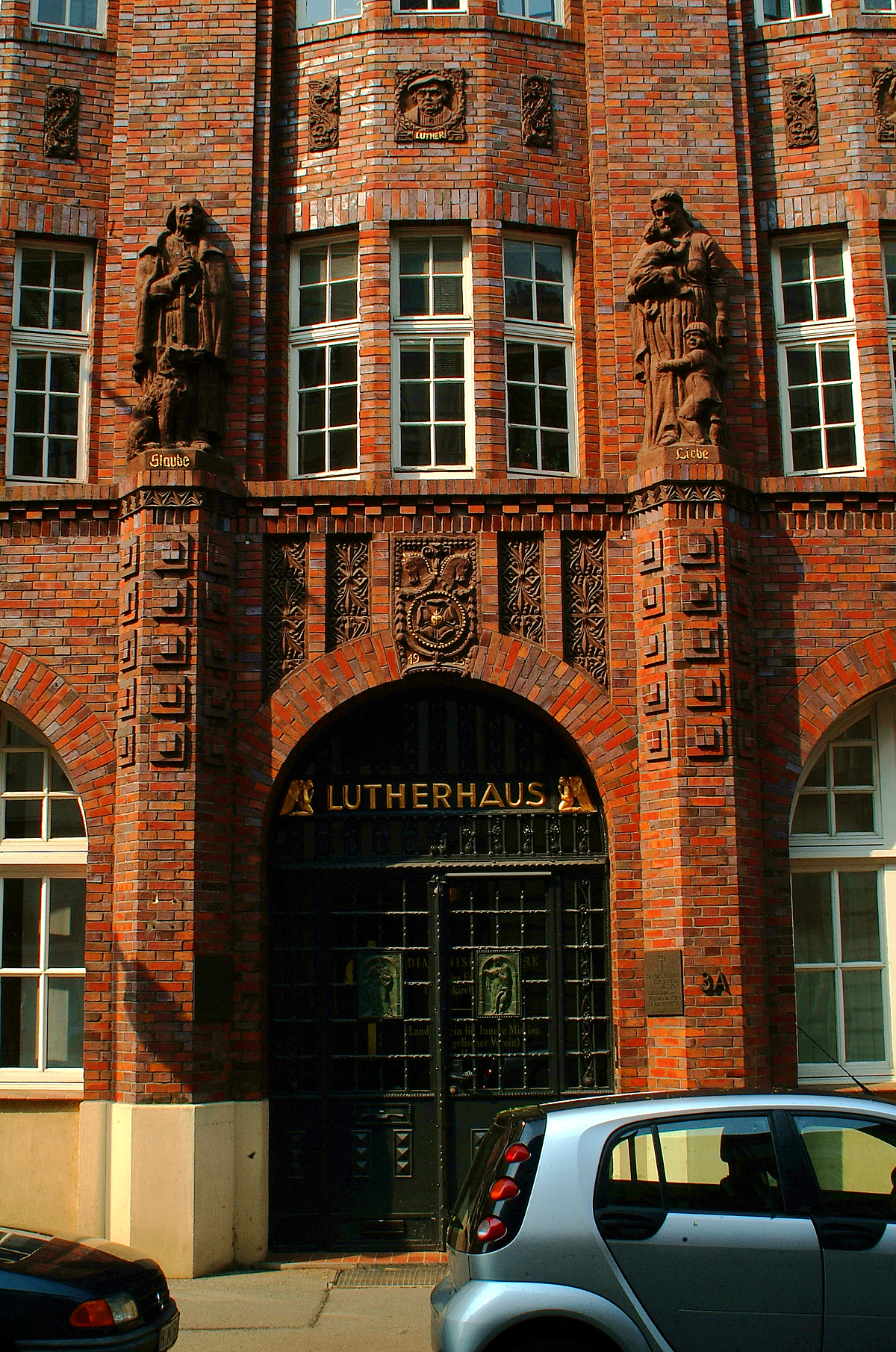 Sie haben aussagekräftigere, bessere, ergänzende Bilder? Sogar ein historisches Dokument? Zeigen Sie' s uns. Stiften Sie es Ihren Kindern, unseren Enkeln, allen Menschen.